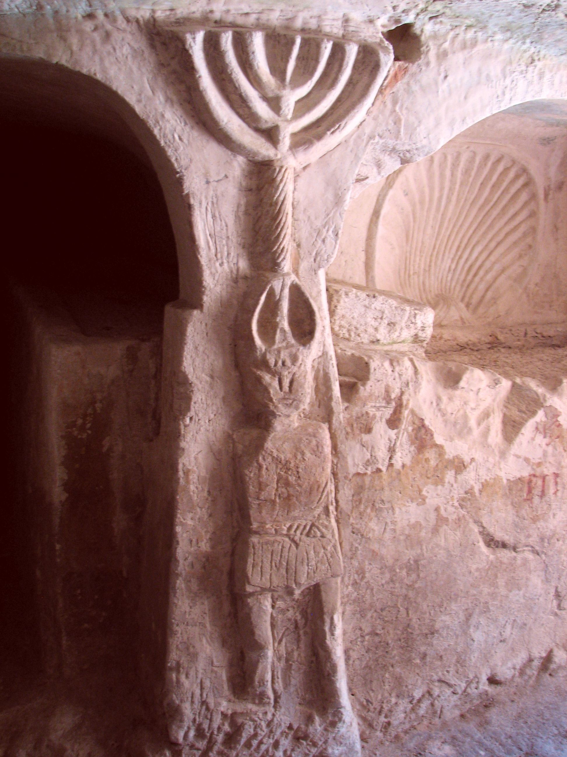 בית שערים הוא אתר ארכאולוגי השוכן בגליל התחתון. במקום התקיים יישוב יהודי חשוב בתקופת בית שני, המשנה והתלמוד. מערת הלוחם ומנורתו - מספרה 3. שמה של המערה ניתן לה מתבליט של מנורה בעלת שלוש רגליים המוצבת על ראש לוחם. הכתובות במערה מעידות שהמערה שמשה לקבורת יהודים מתדמור. במערה חמישה אולמות וכשמונים קברים. במערה נמצאו מס' תבליטי מנורות.